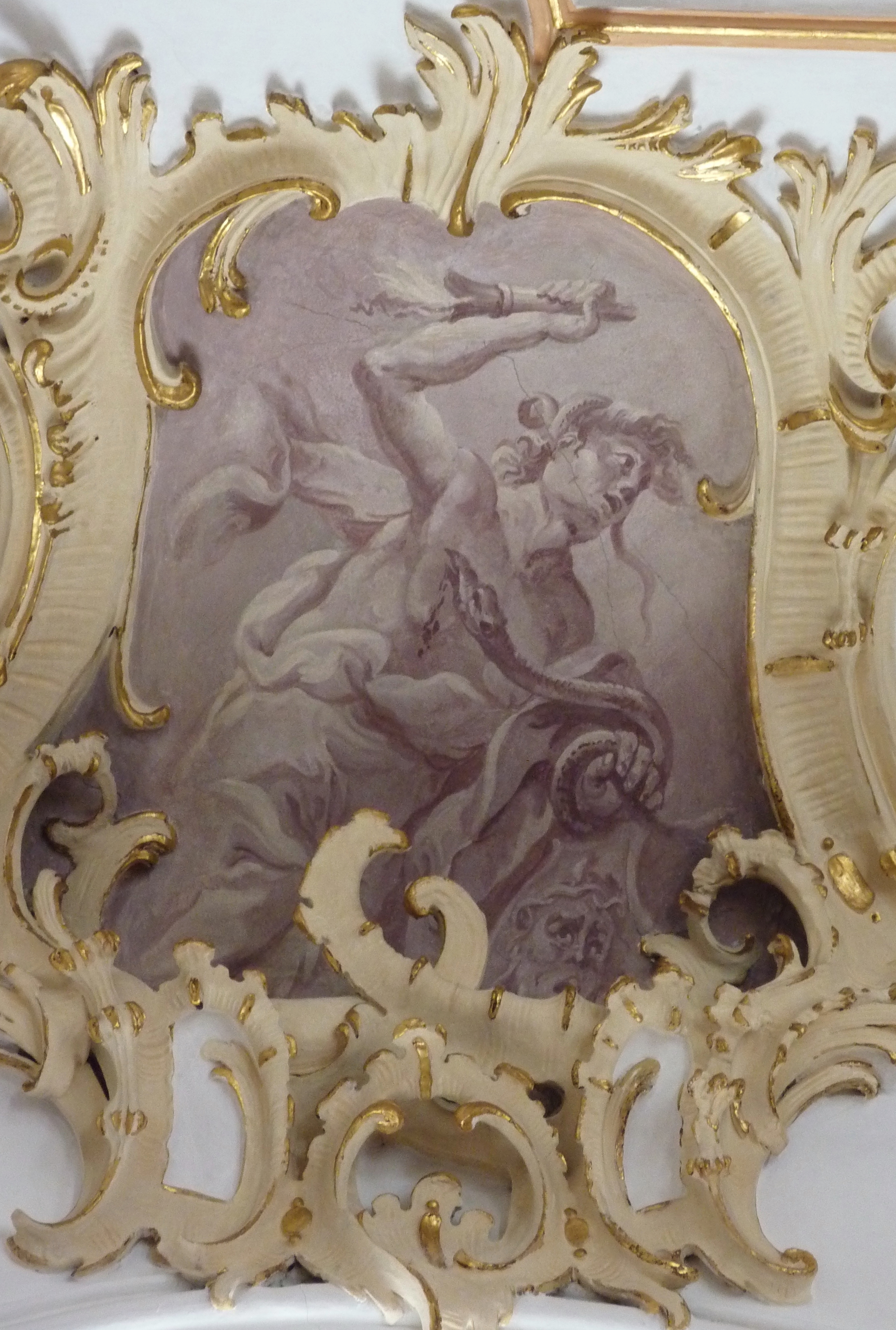 Katholische Pfarrkirche St. Michael in Lutzingen, einer Gemeinde im Landkreis Dillingen an der Donau (Bayern), Deckenfresko im Chor, von Johann Anwander, von 1767, Grisaille mit allegorischer Darstellung des Zorns